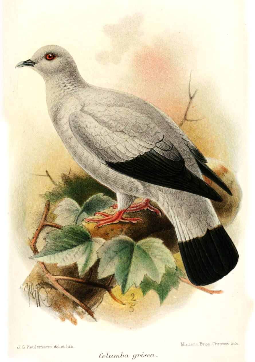 Columba grisea = Columba argentina Silvery Pigeon